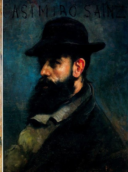 Casimiro Sáinz Sanz (1853-1898): paisajista santanderino (Cantabria, España) con una destacable obra de paisajes y realismo costumbrista. Bibliografía: Casimiro Sáinz Sanz en el C.E.M.